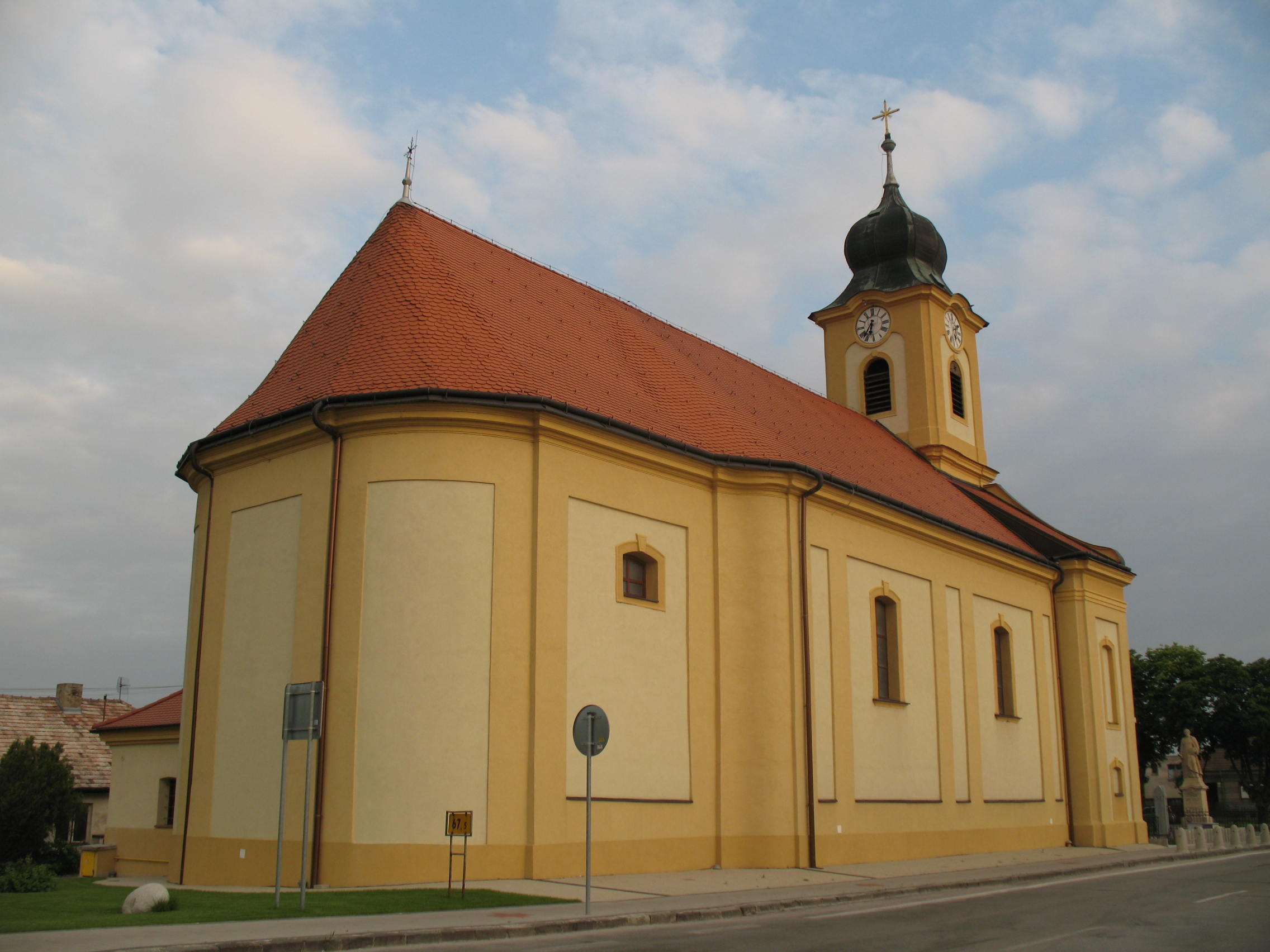 Vágmedence